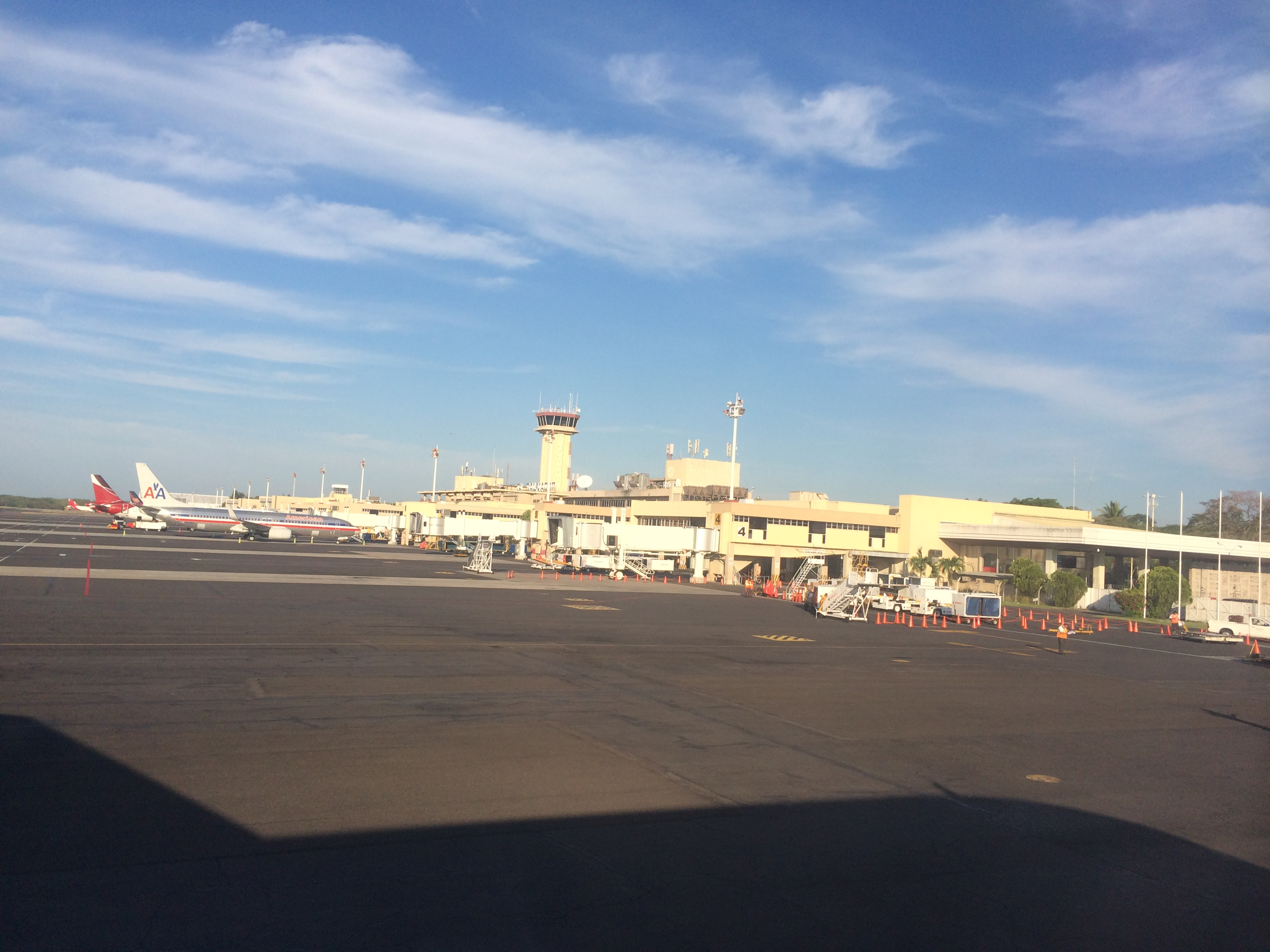 Aeropuerto Internacional de El Salvador.